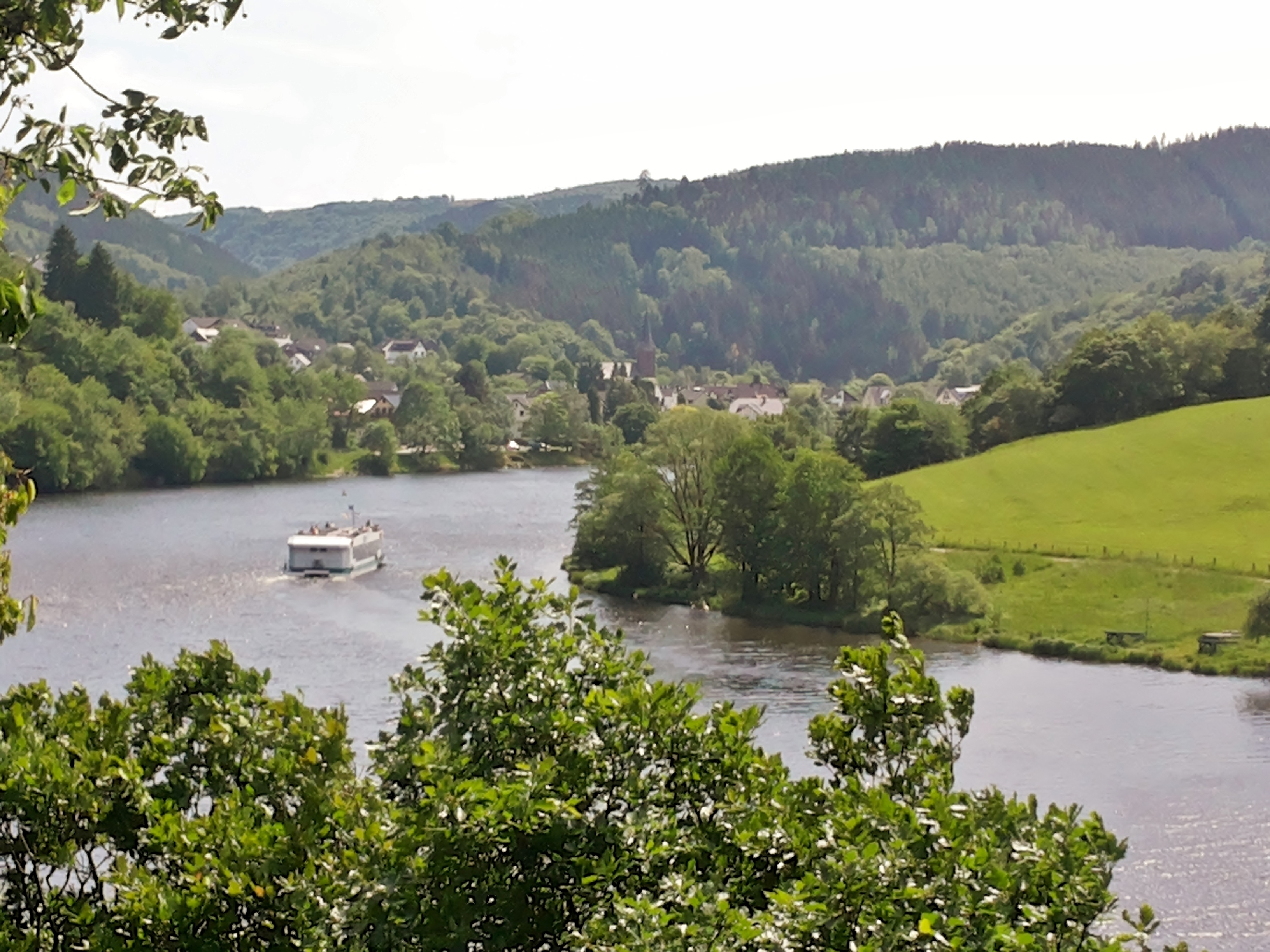 Einruhr am Obersee der Rurtalsperre